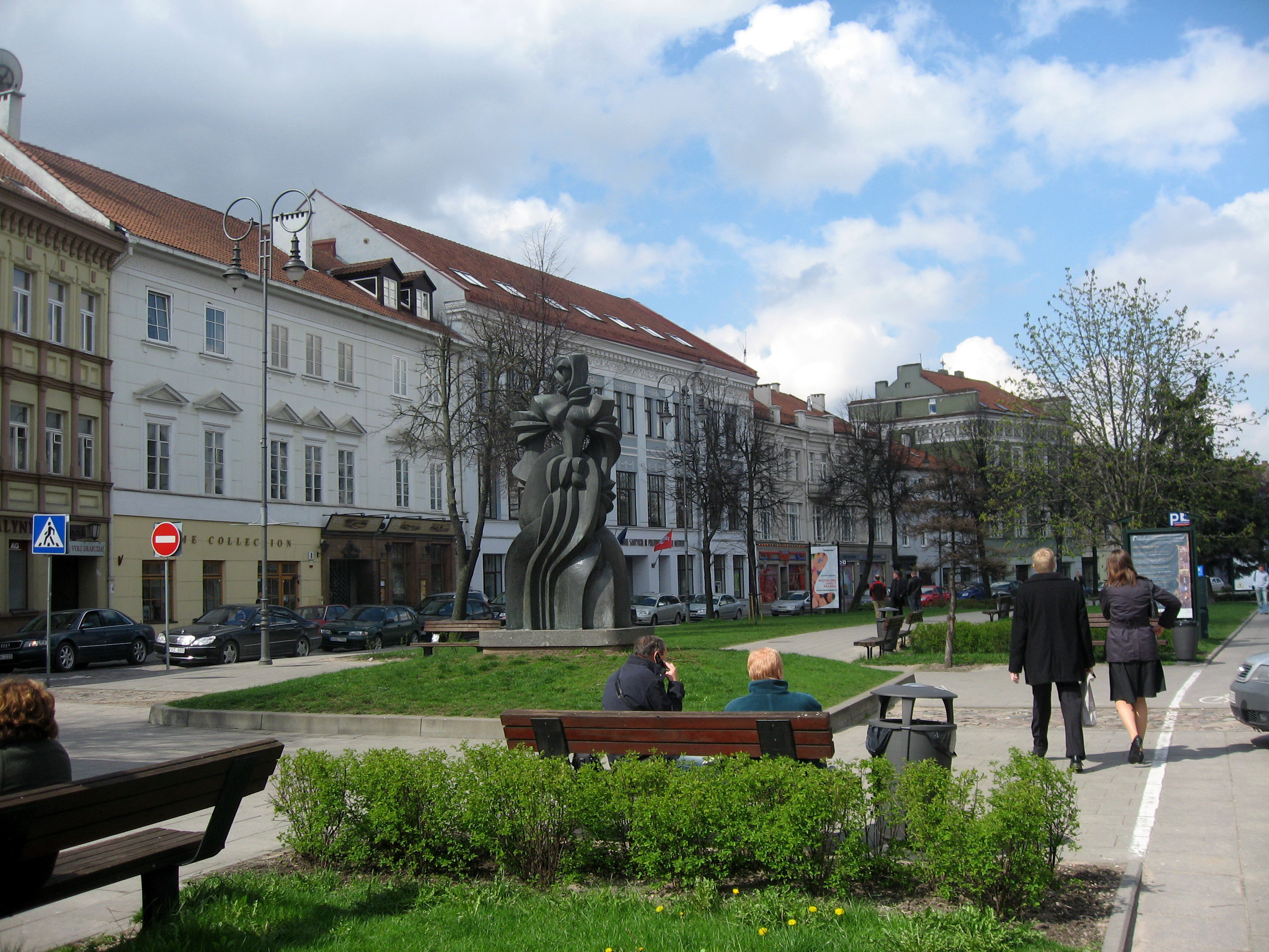 Vilnius, náměstí v centru města